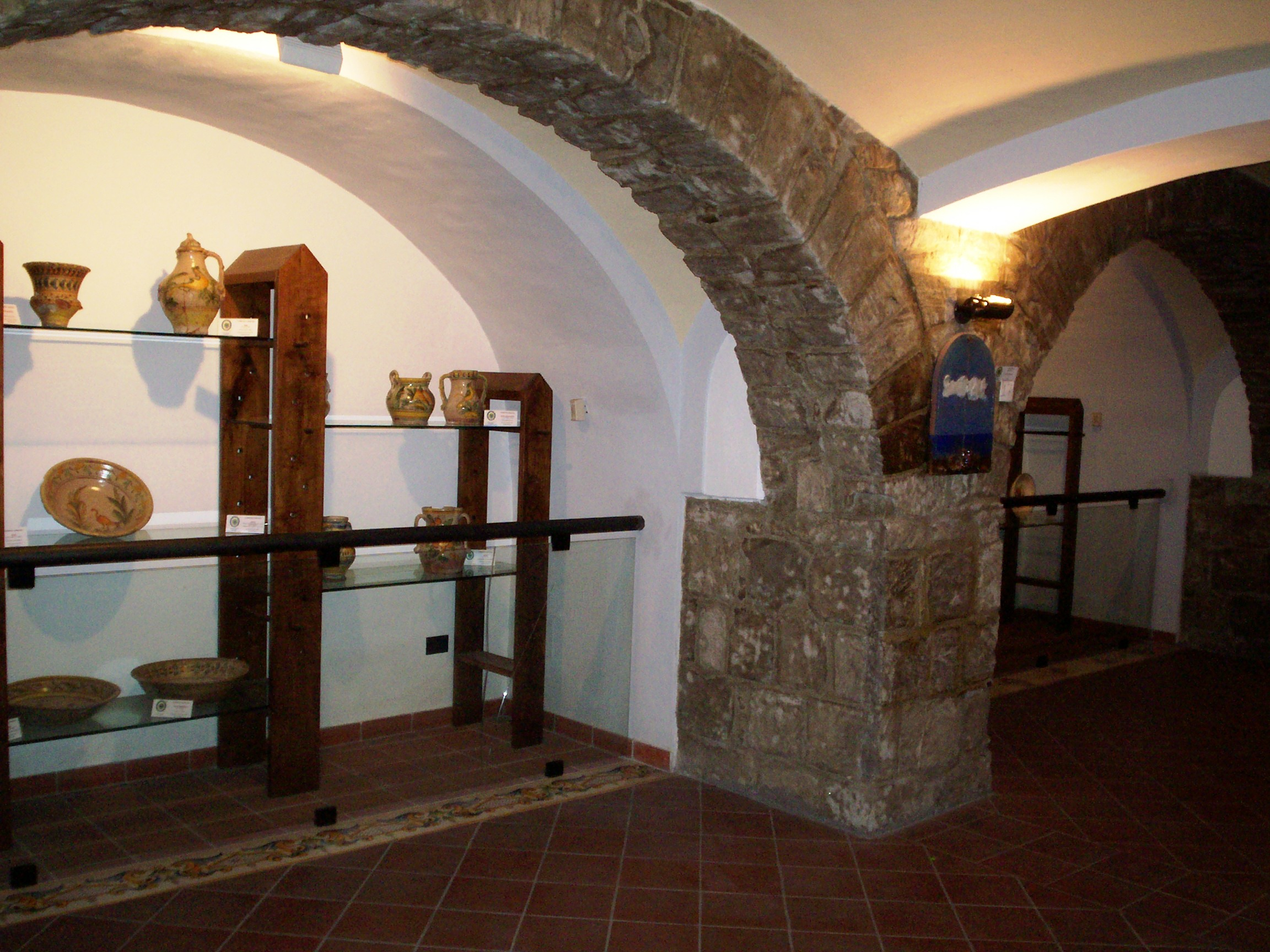 particolare del museo civico e della ceramica di Cerreto Sannita (Bn)